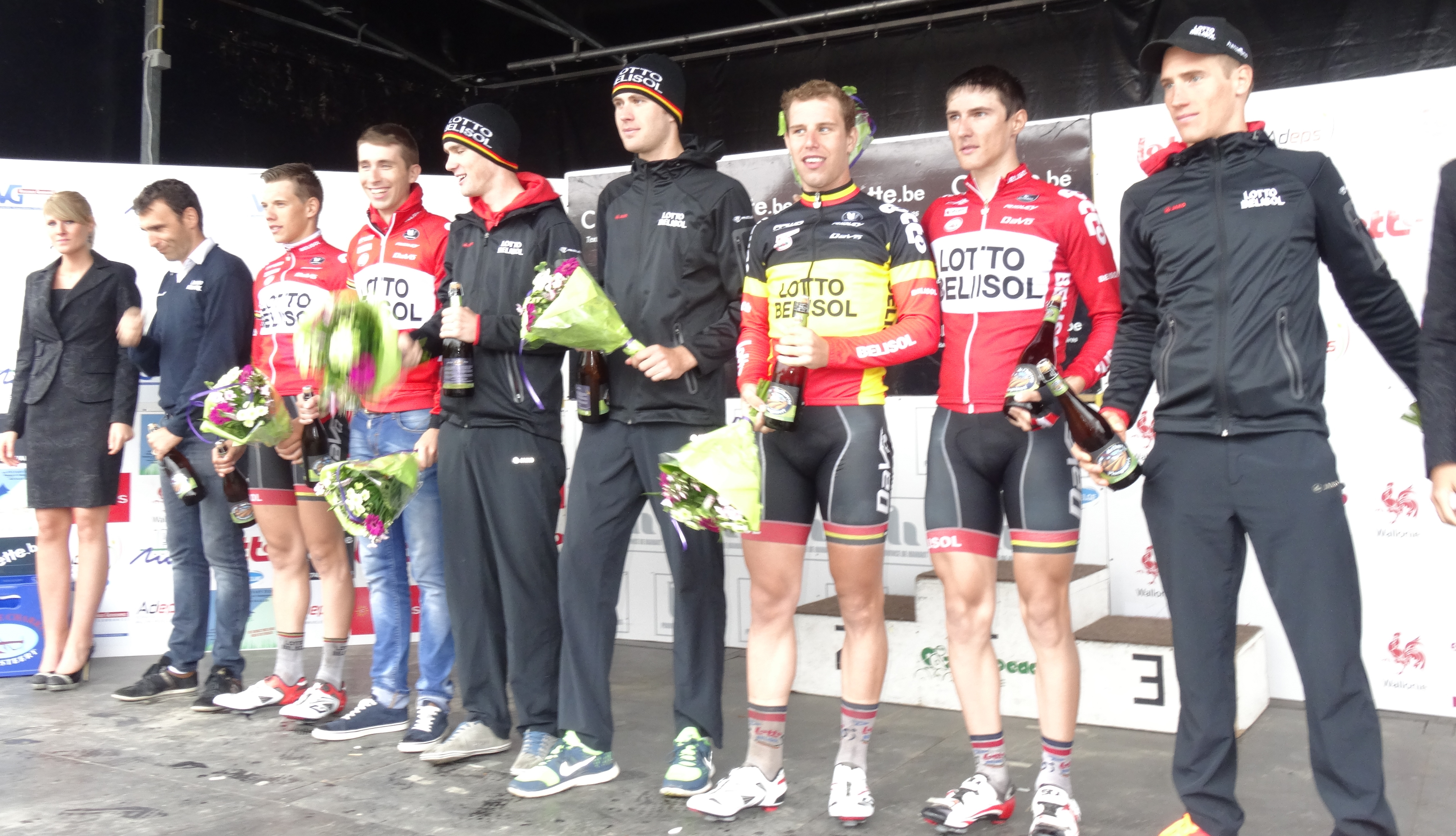 Reportage photographique réalisé le samedi 30 août à l'occasion du départ et de l'arrivée du Grand Prix des commerçants de Templeuve 2014 à Templeuve (Tournai), Belgique.